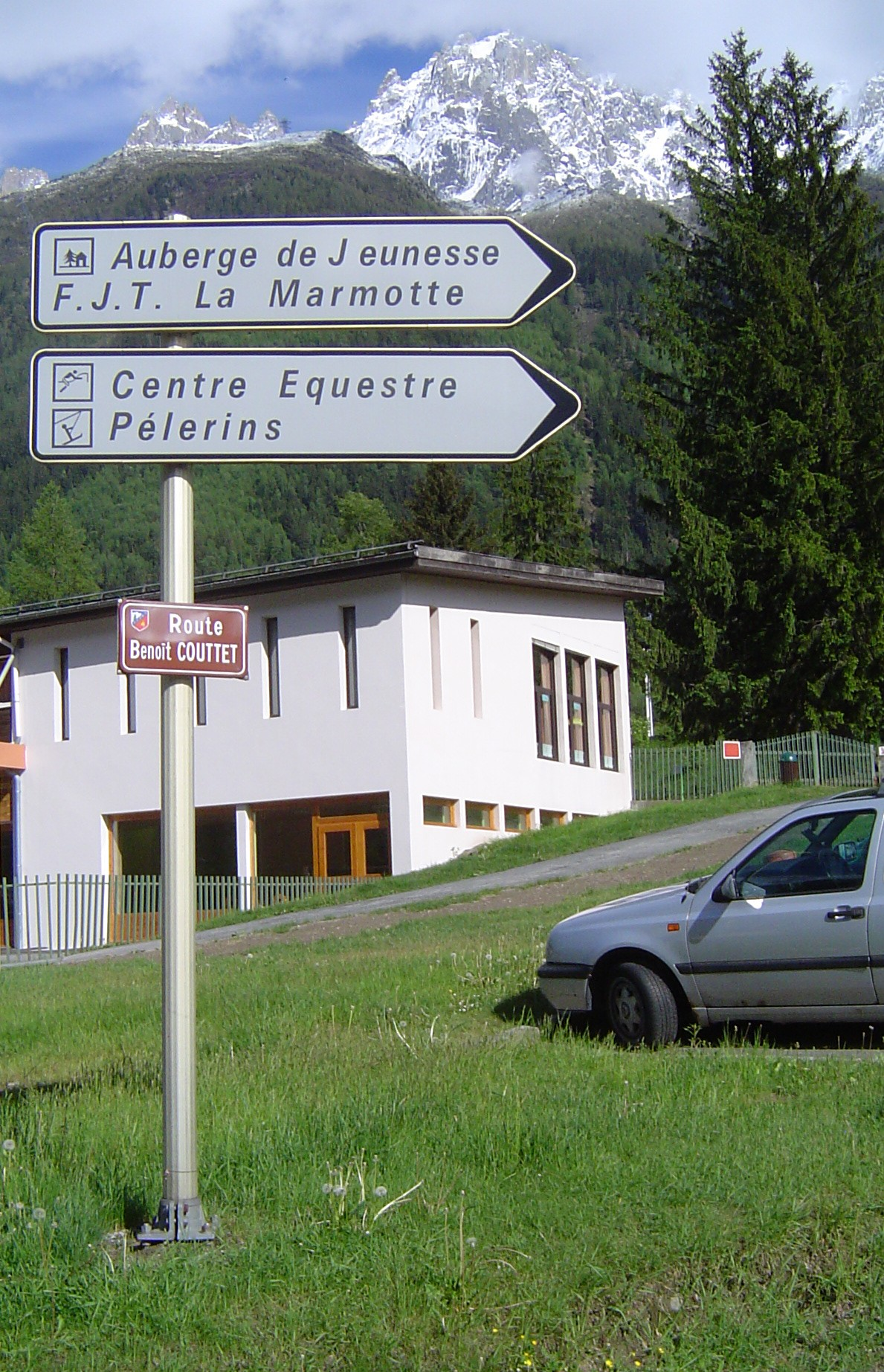 Photo prise dans le quartier des Pélerins à Chamonix-Mont-Blanc (France)